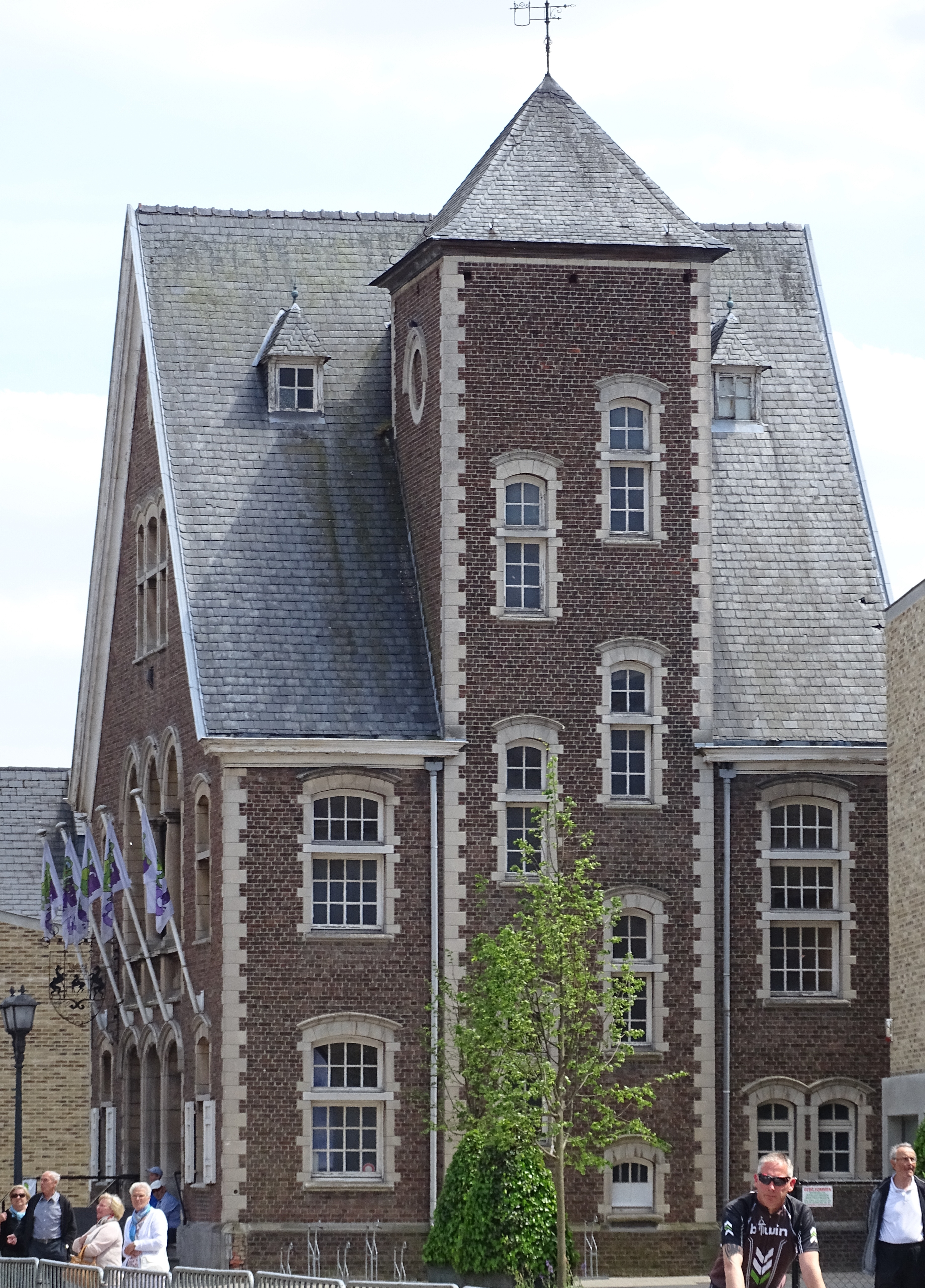 Reportage réalisé le dimanche 7 juin à l'occasion de l'arrivée du Mémorial Philippe Van Coningsloo 2015 à Bonheiden, Belgique.